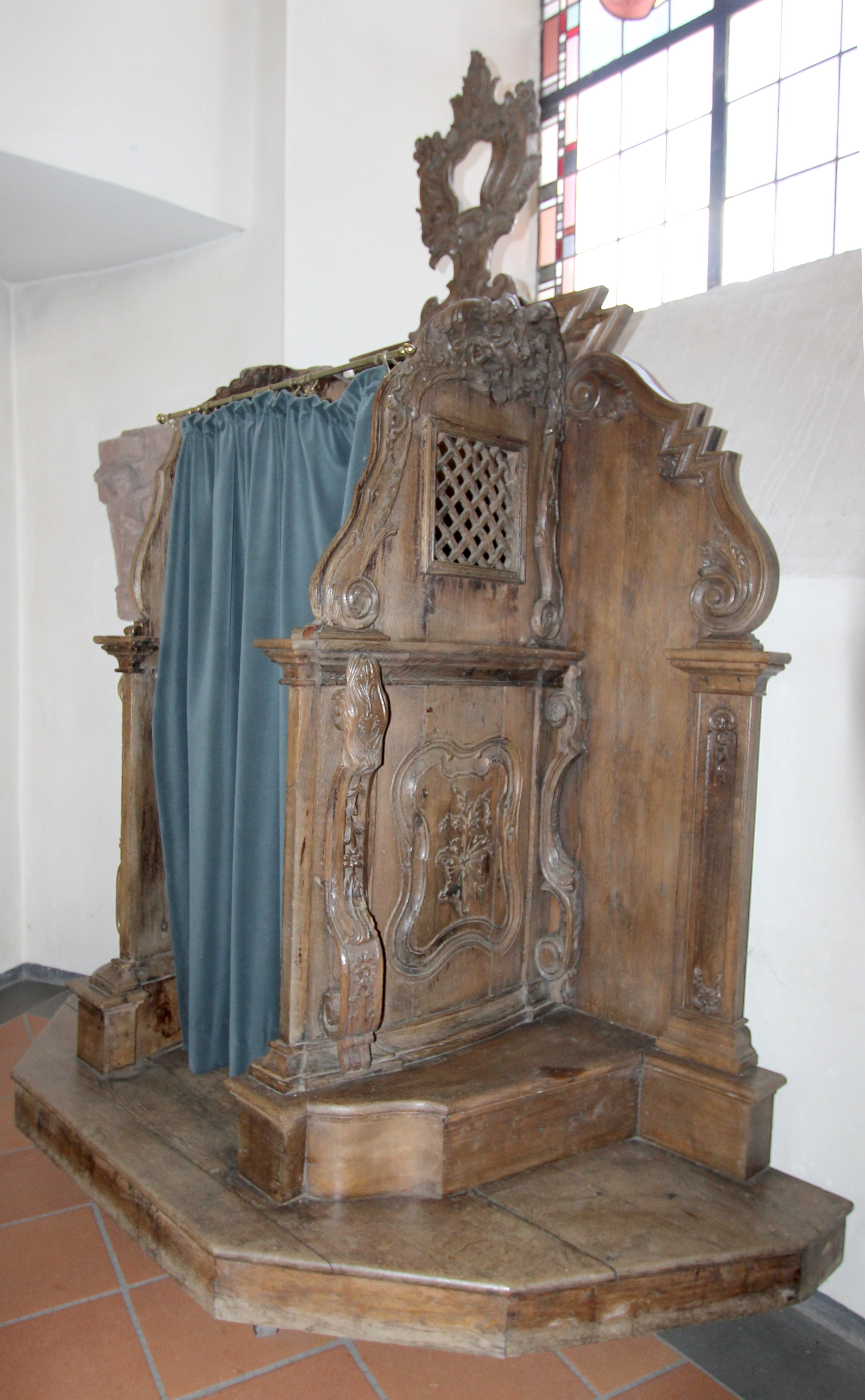 54570 Rockeskyll, Dorfstraße 41. Romanischer Westturm, ursprünglich spätgotischer Einstützenraum von 1511, 1840 erweitert, 1891 über zwei Mittelstützen neu gewölbt. Aufnahme von 2018.